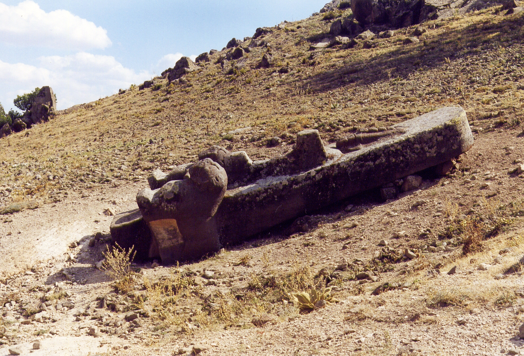 Hethitische Großskulptur bei Fasillar, Nähe Konya, Türkei